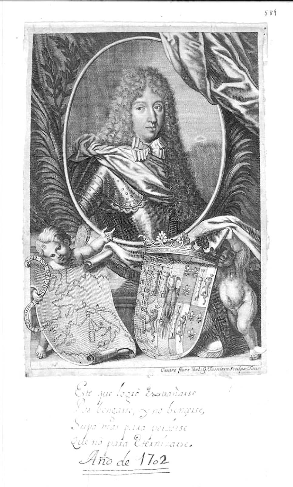 Retrato de Juan Tomás Enríquez de Cabrera. Grabado calcográfico firmado "Cesare Fiore deli; G. Tasniere sculps: Taur:". Inscripción manuscrita a tinta en un papel pegado: "Este que logró Extrañarse / Por Bengarse, y no bençerse, / Supo mas para perderse / Que no para Eternizarse. / Año de 1702"